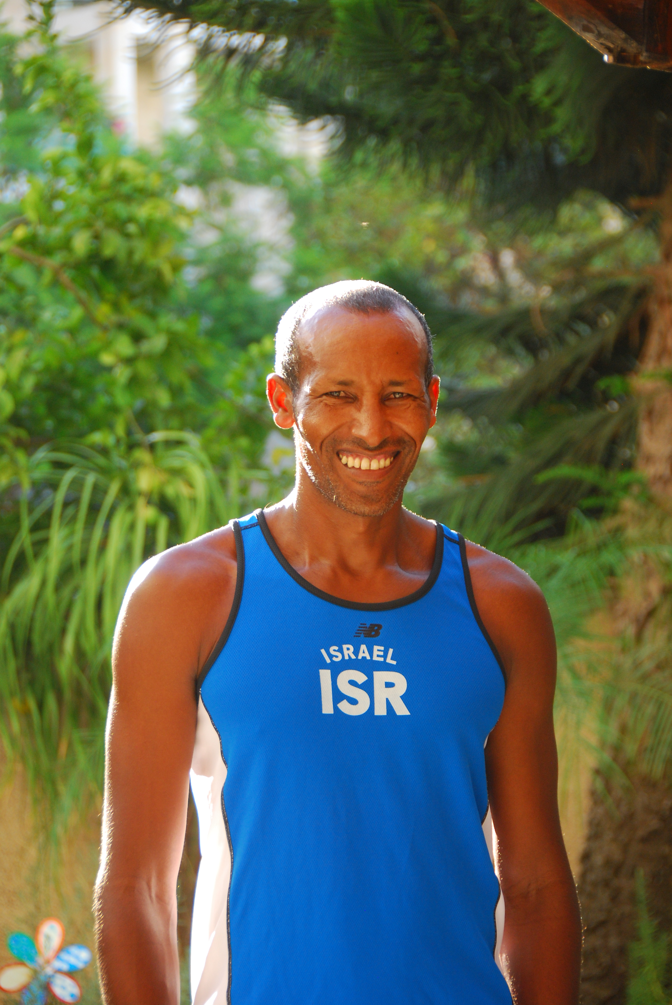 גזצ'או יוסף